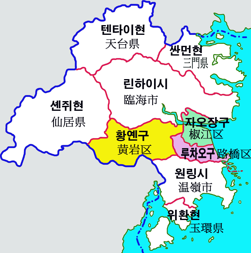 타이저우시 지급구역도